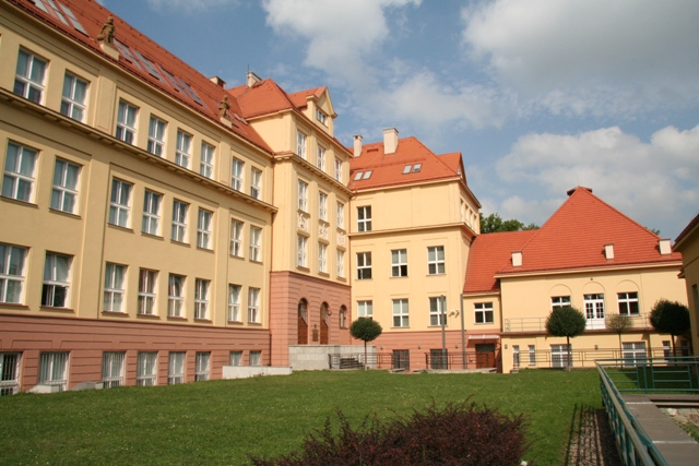 Hlavní budova Pedagogické fakulty Univerzity J. E. Purkyně v Ústí nad Labem